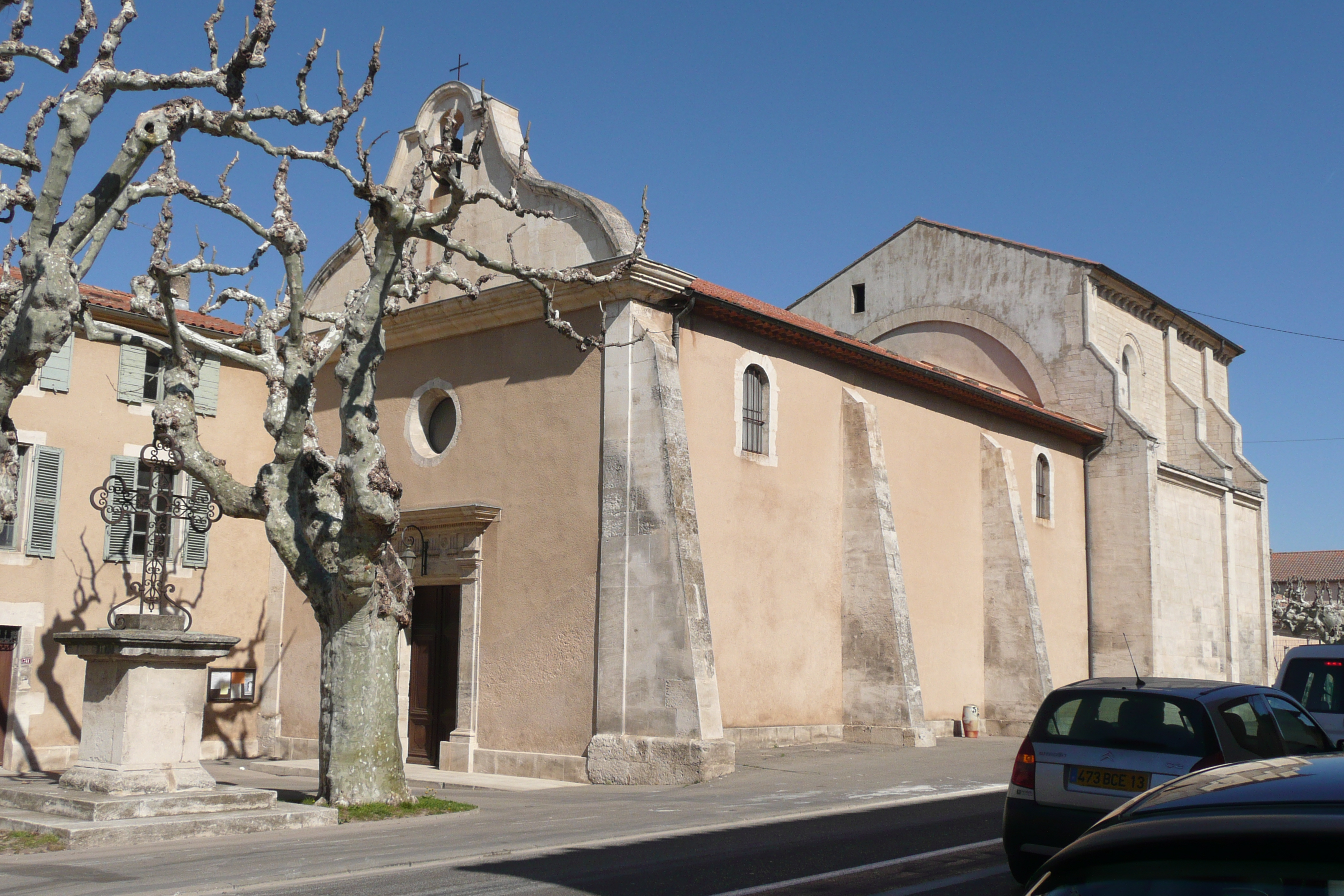 Eglise à Plan d'Orgon.